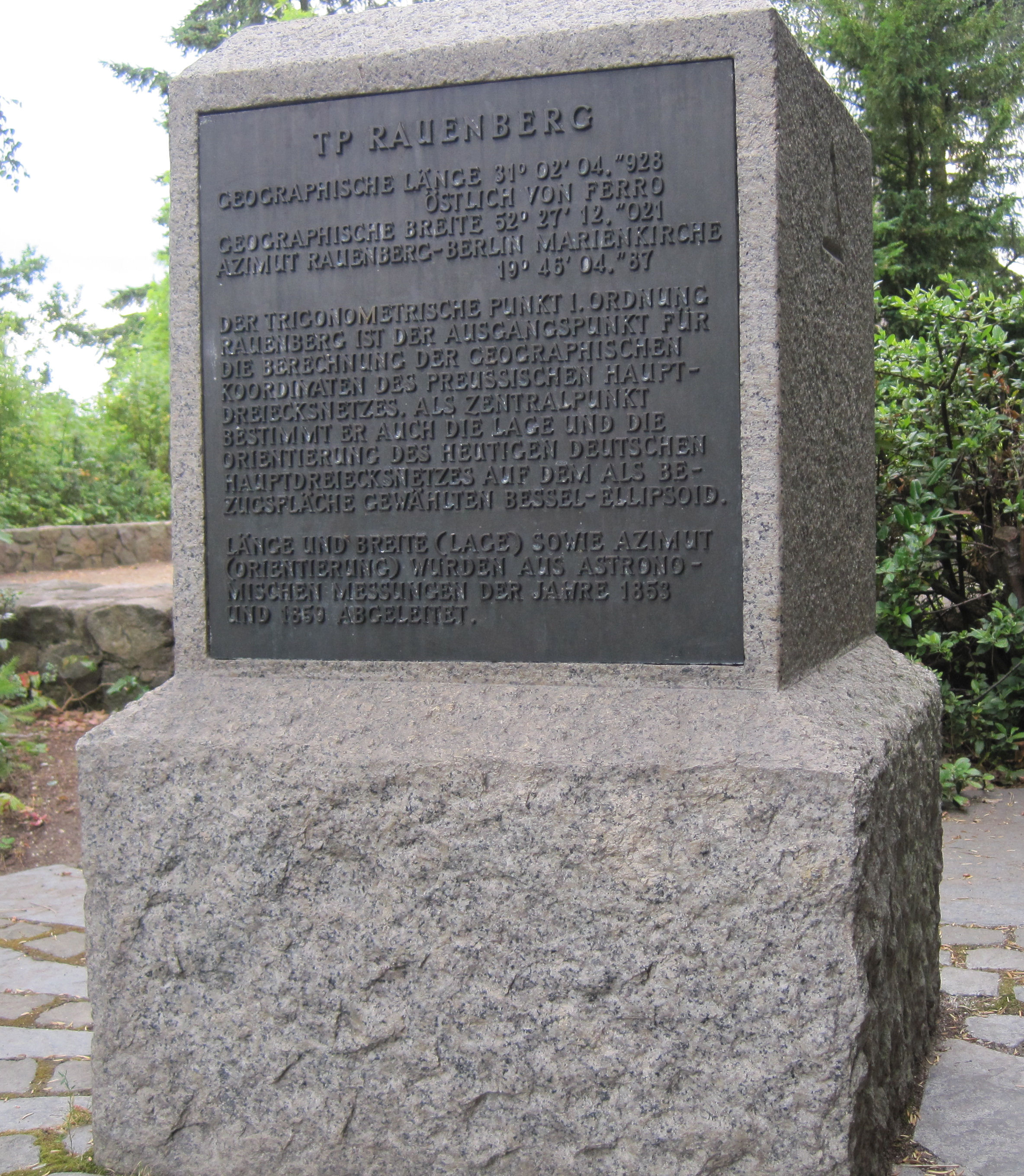 Ansicht des Denkmals TP Rauenberg in Berlin-Tempelhof, Schriftplatte